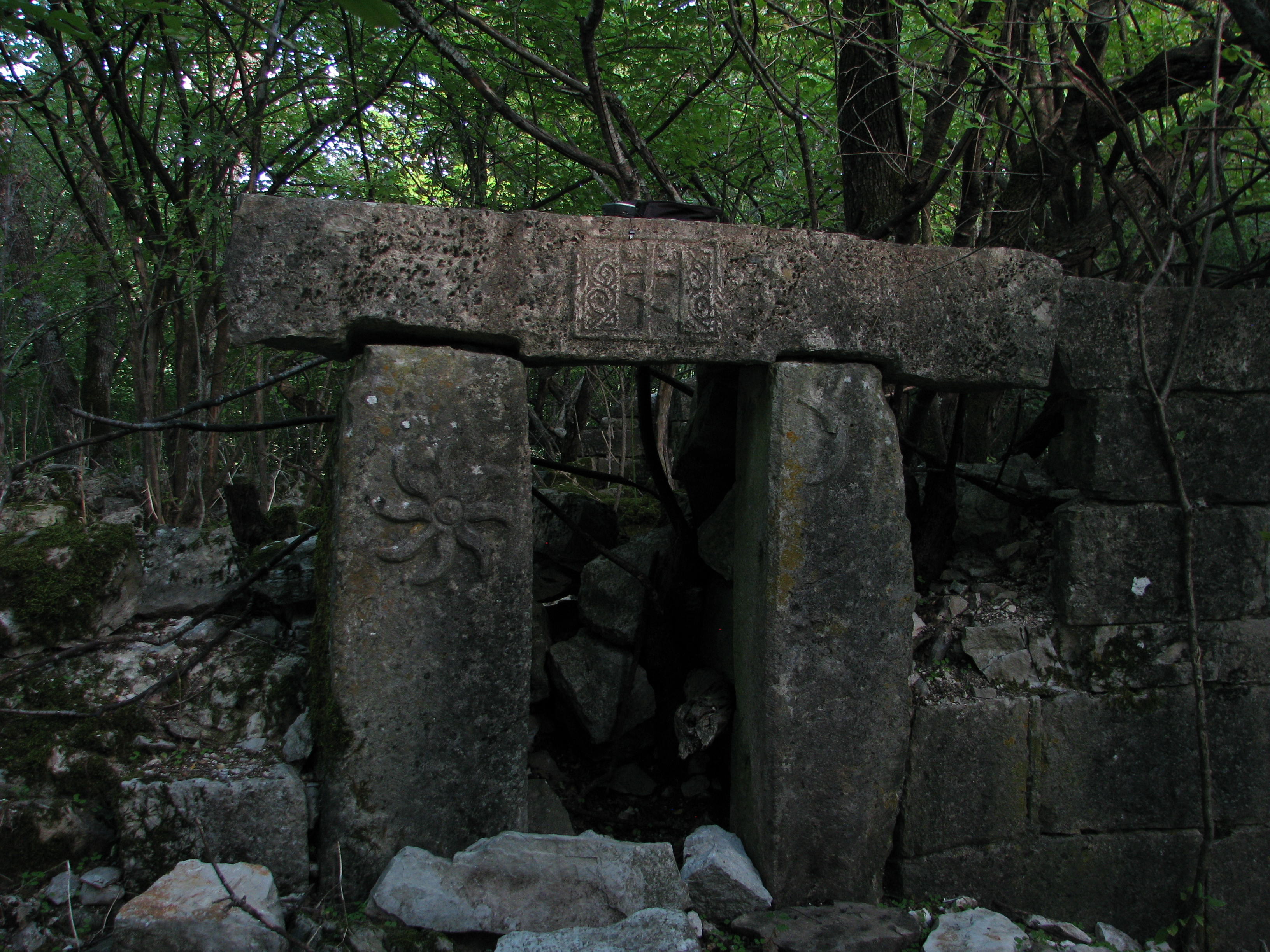 NKD260, Ostaci Predojevića crkve, Prijevor, u blizini Bileće. Crkvu je prema predanju podigao Hasan-paša Predojević za svoju majku, koja nije htjela da predje u islam. Na zidu vidljivi simboli polumjeseca, krsta i sunca.